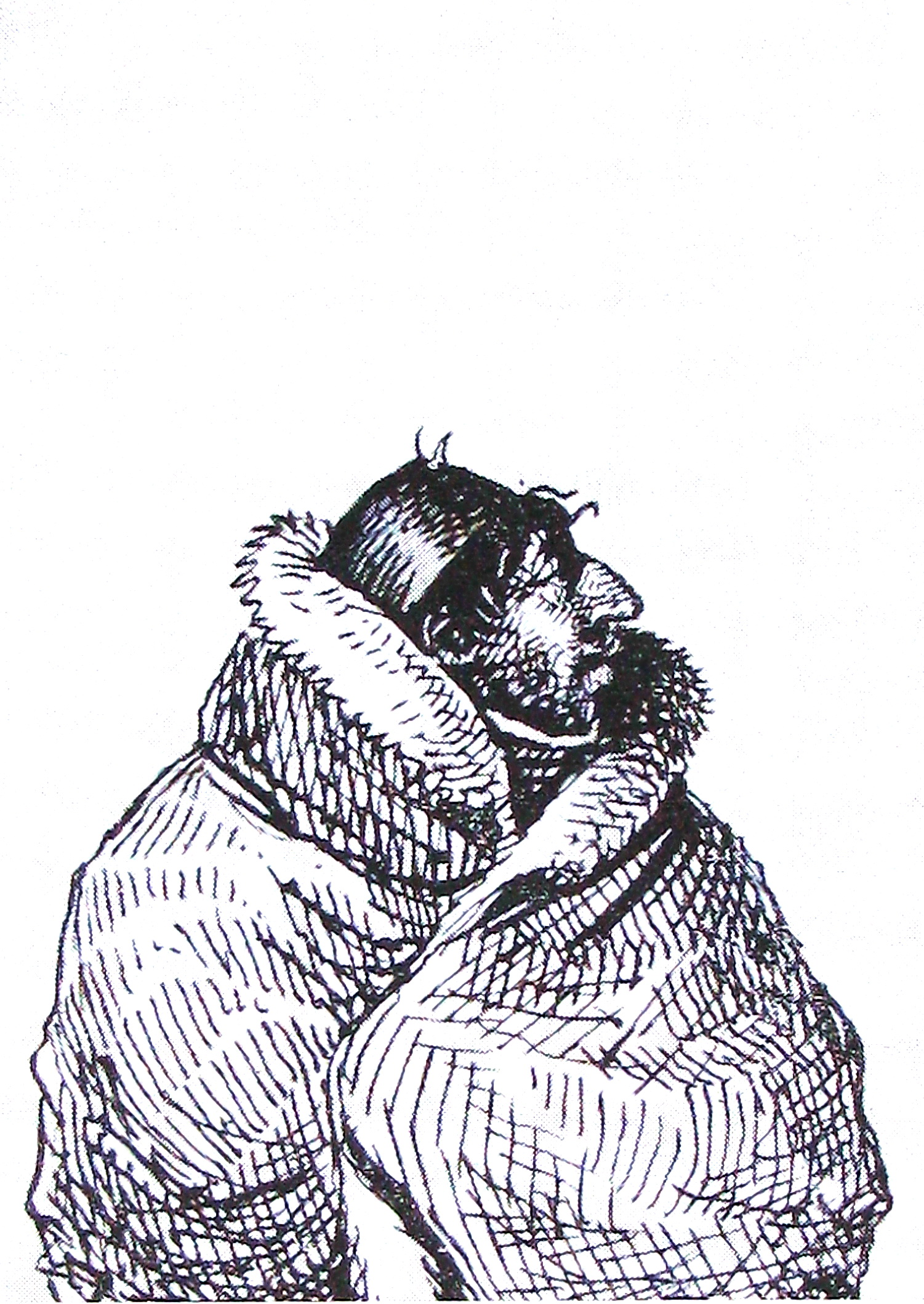 Ян Рустэм. Аўтапартрэт. Папера, туш.